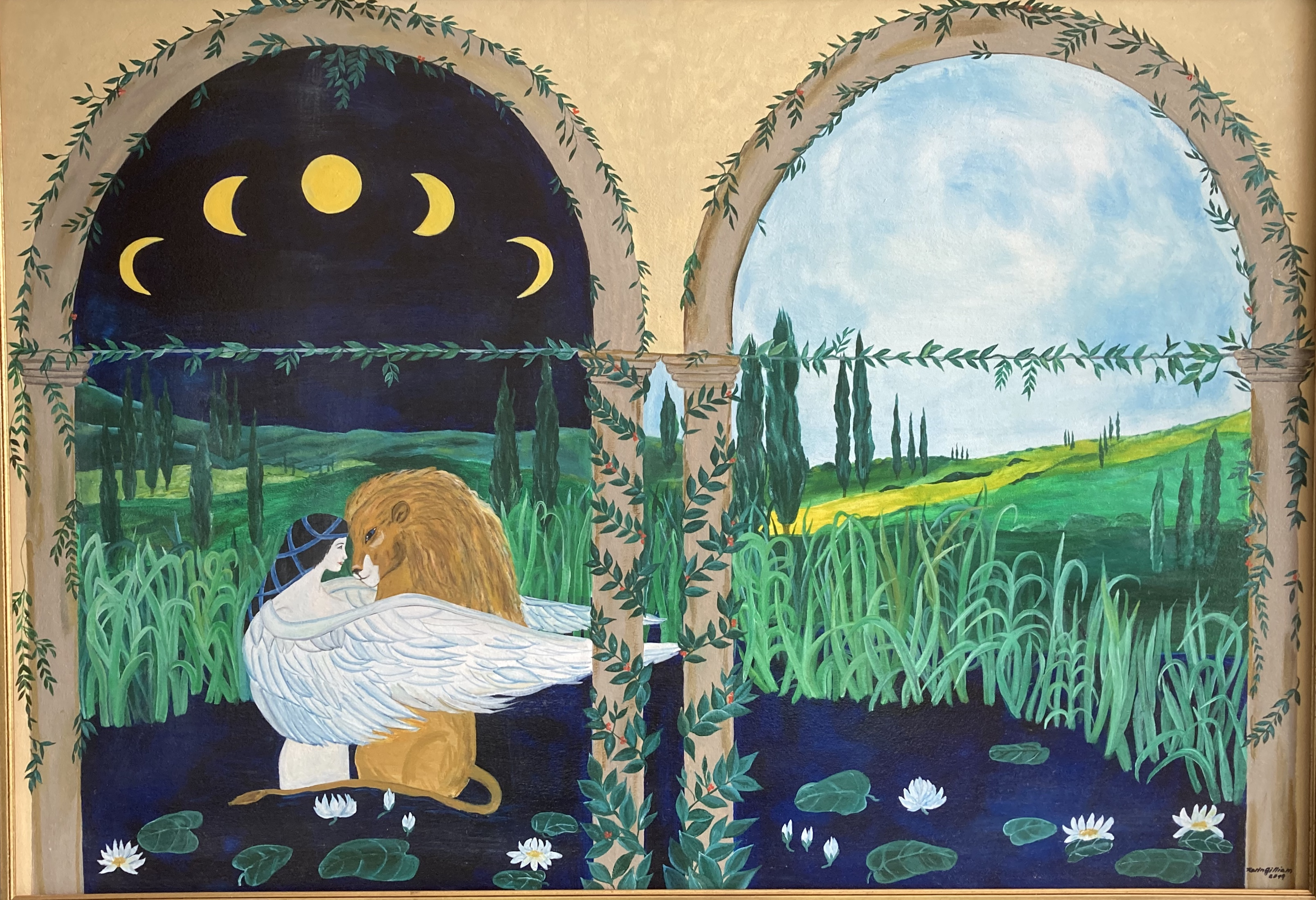 Faszination des Mondes